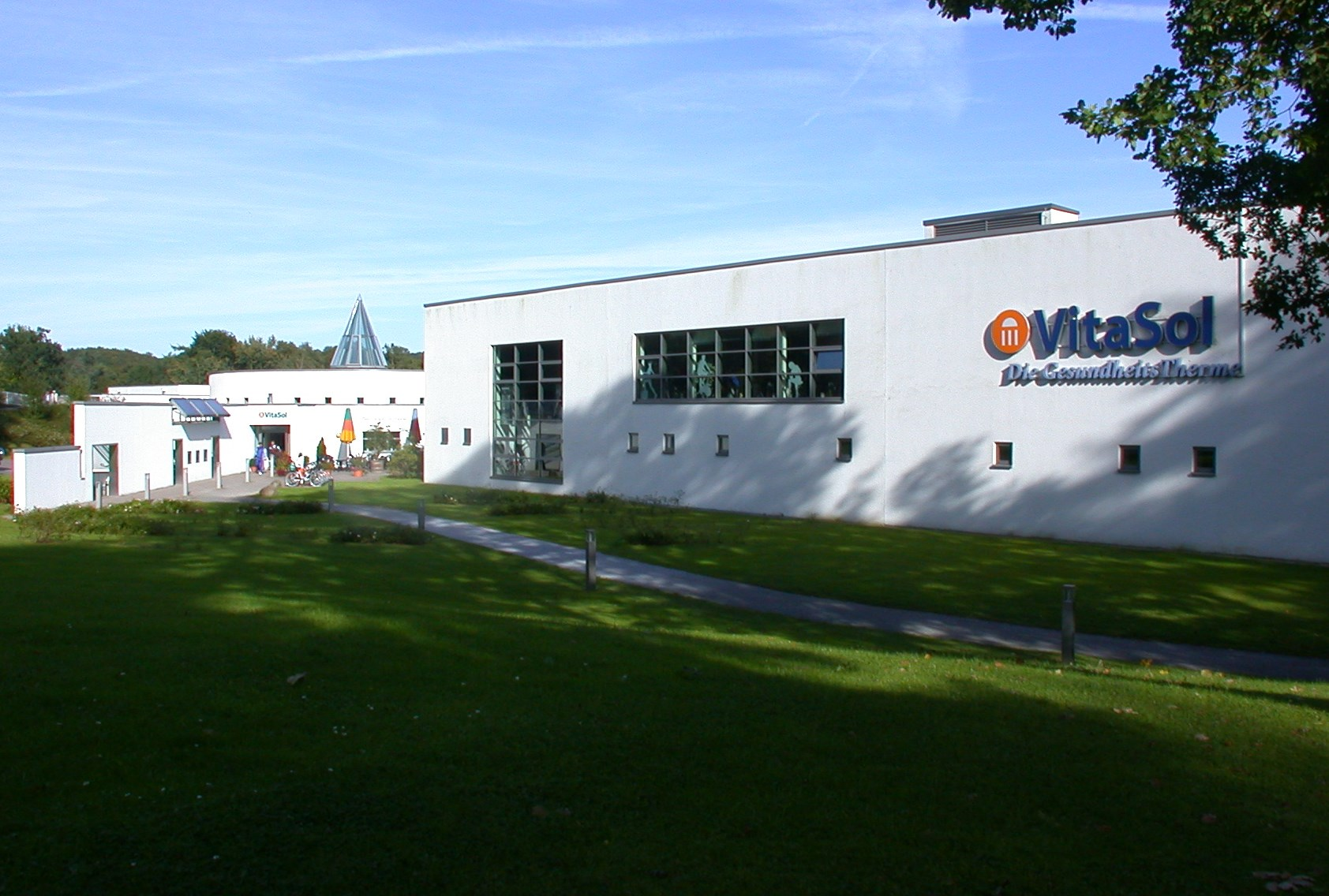 Deutschland - Nordrhein-Westfalen - Kreis Lippe - Bad Salzuflen: VitaSol